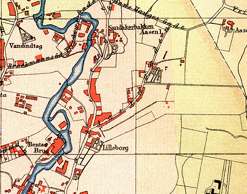 Kart over Lilleborg, 1887